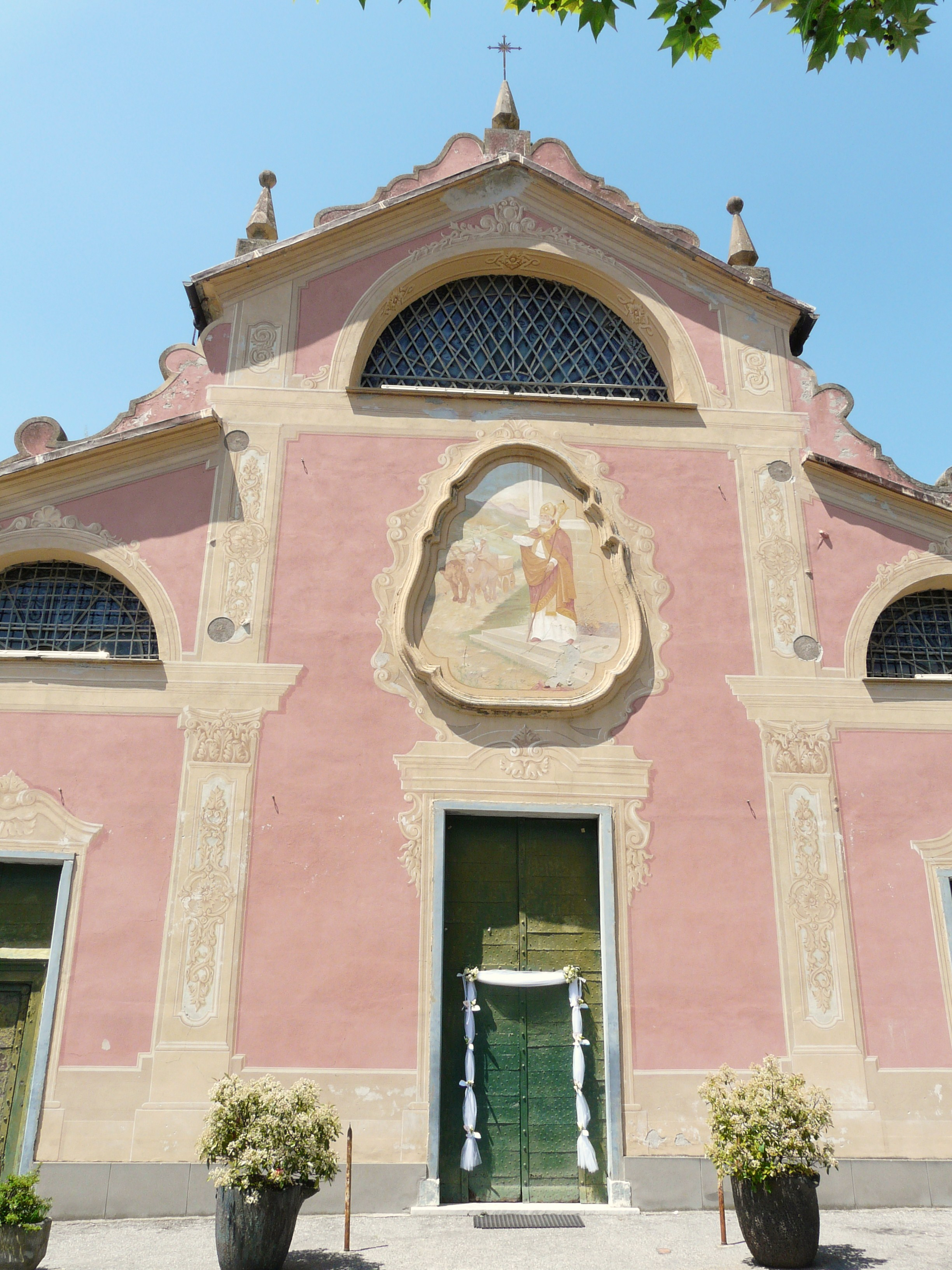 Chiesa di Sant'Olcese, Liguria, Italia